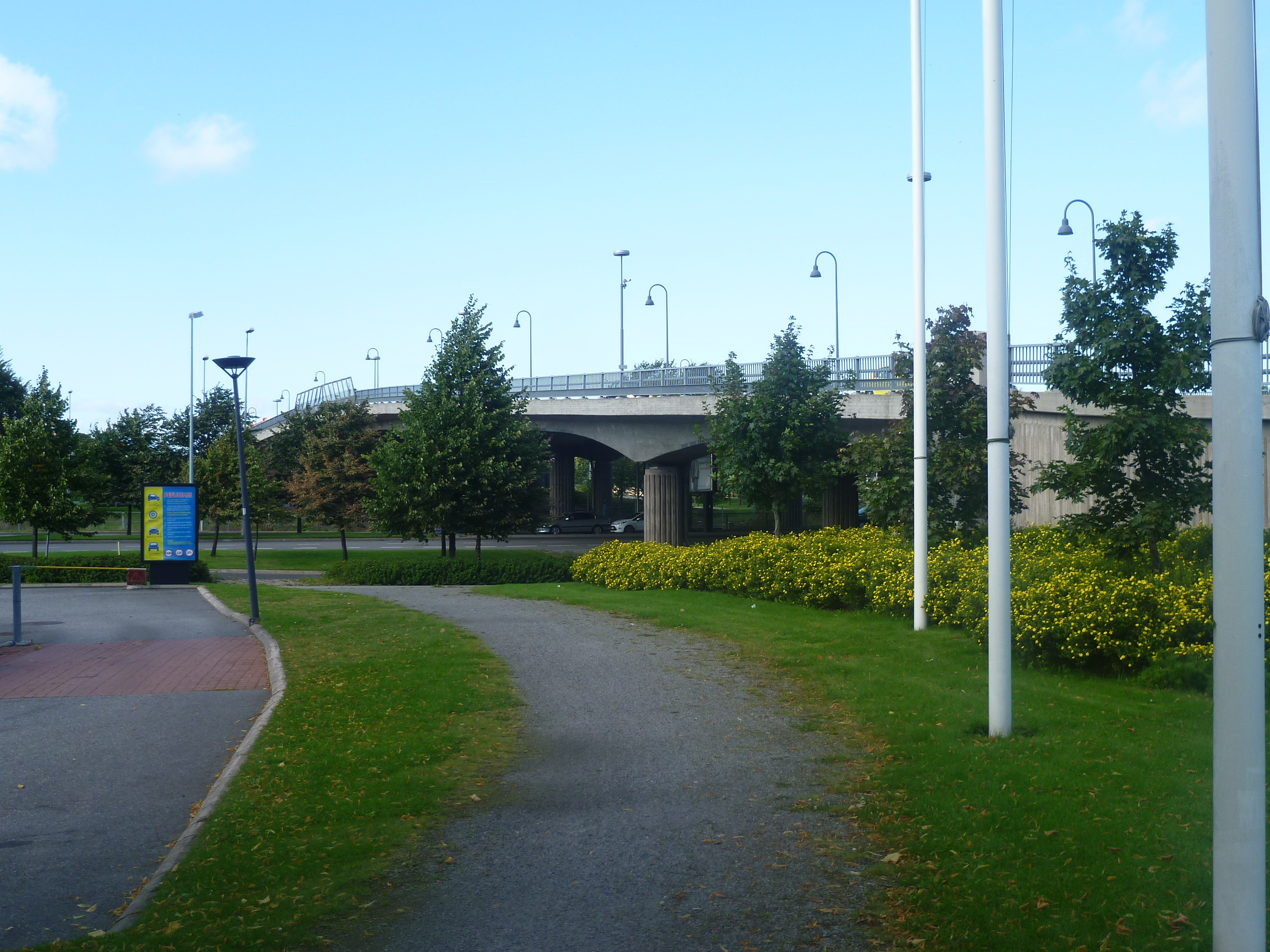 Vuonna 2000 valmistunut Aninkaistensilta Turussa. Kuvattu Hesburgerin (entisen Esson huoltoaseman) vierestä.